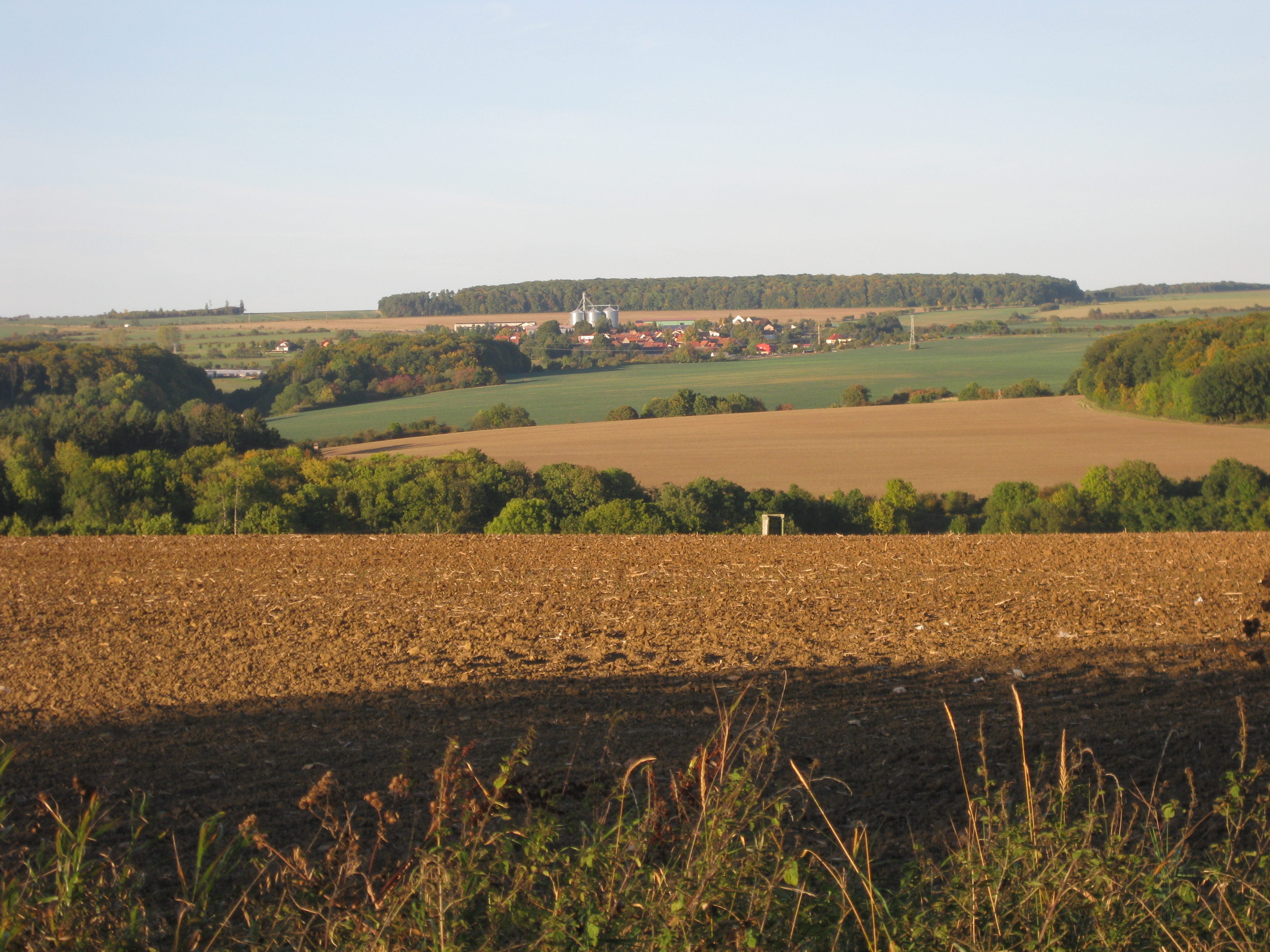 Eigenrode am Südwestrand des Dün von Süden gesehen